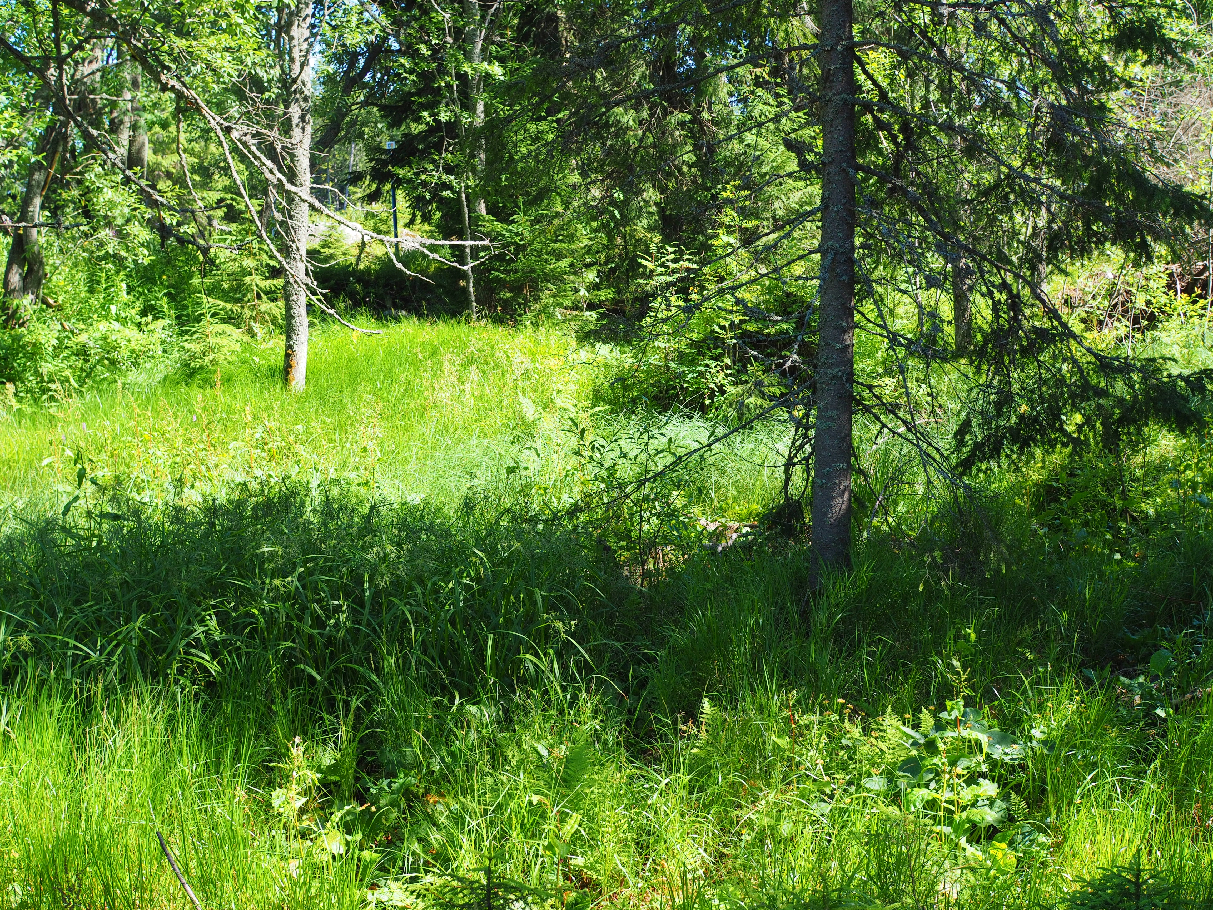 Nature reserve Rašelinisko